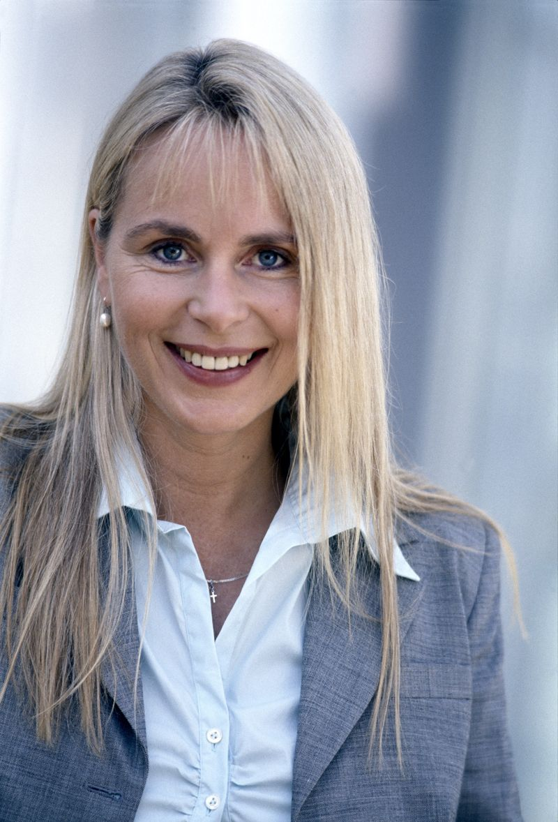 Dr. Martina Krogmann MdB